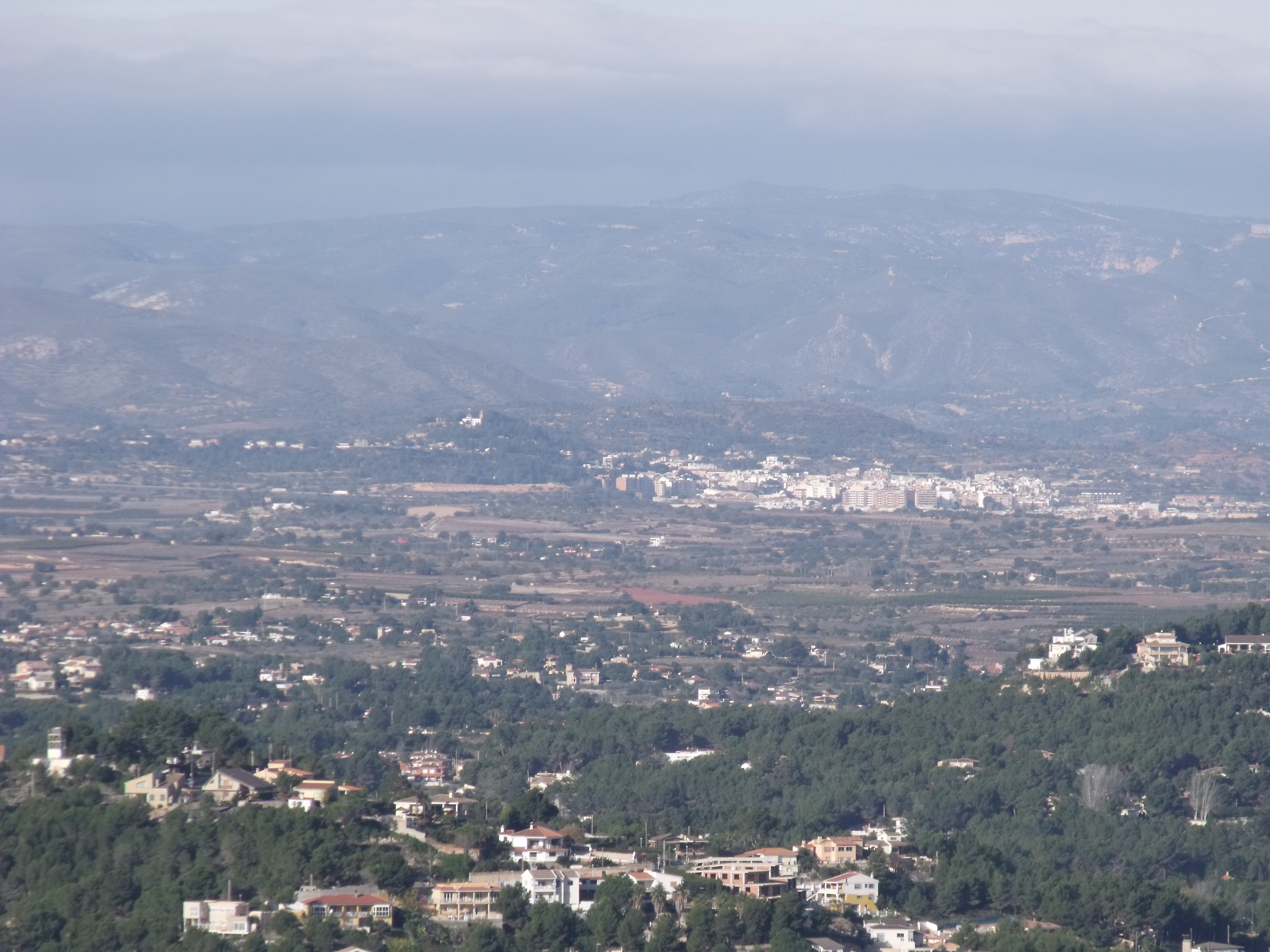 Chiva y varias urbanizaciones de la comarca, vistas desde el SE.